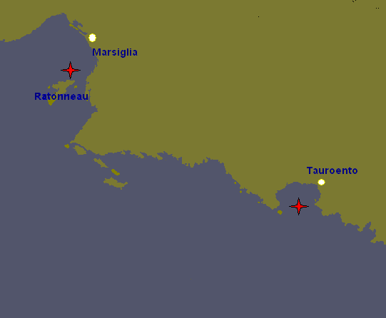 Fatta da me.